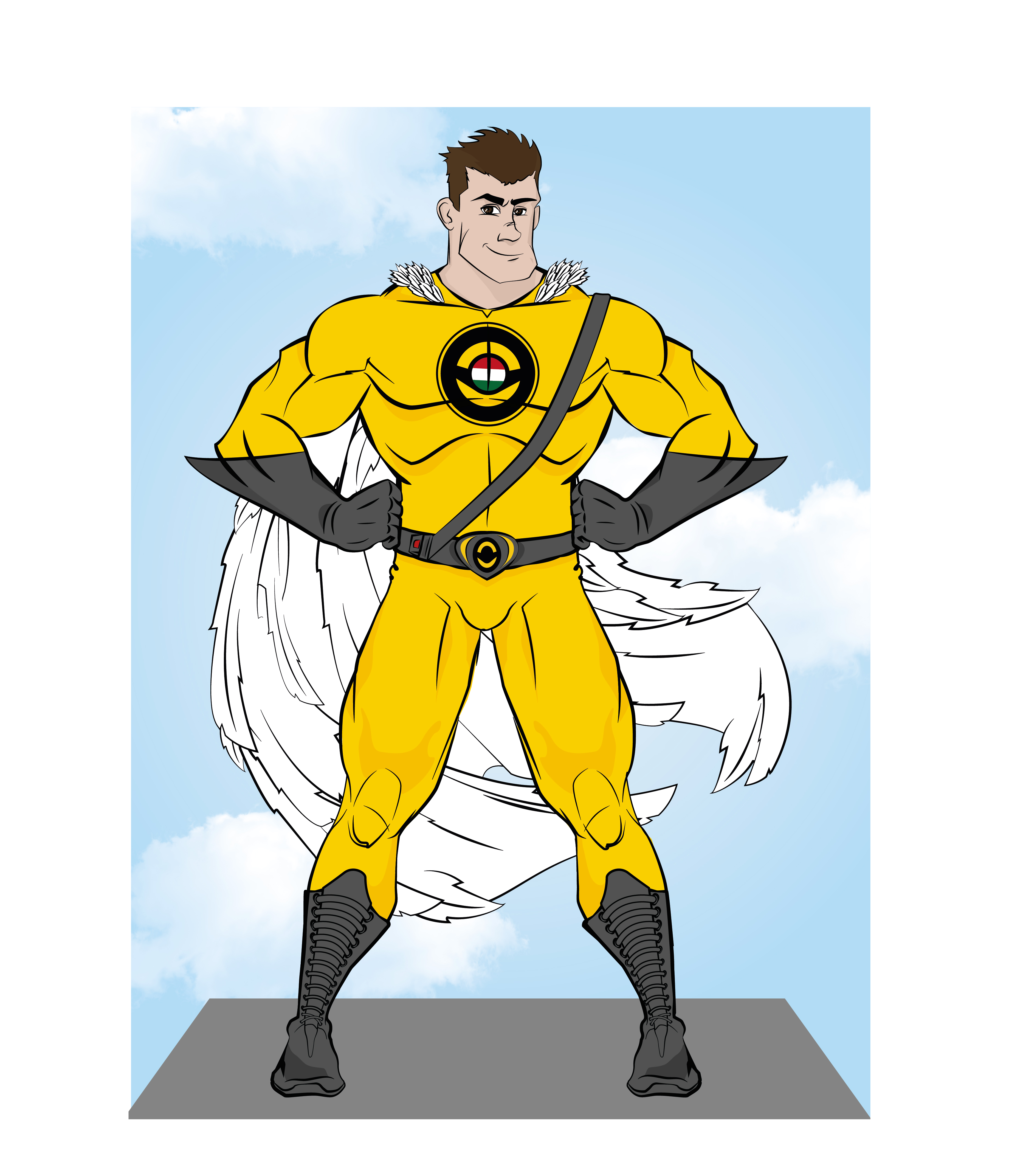 Közlekedésbiztonsági szuperhős